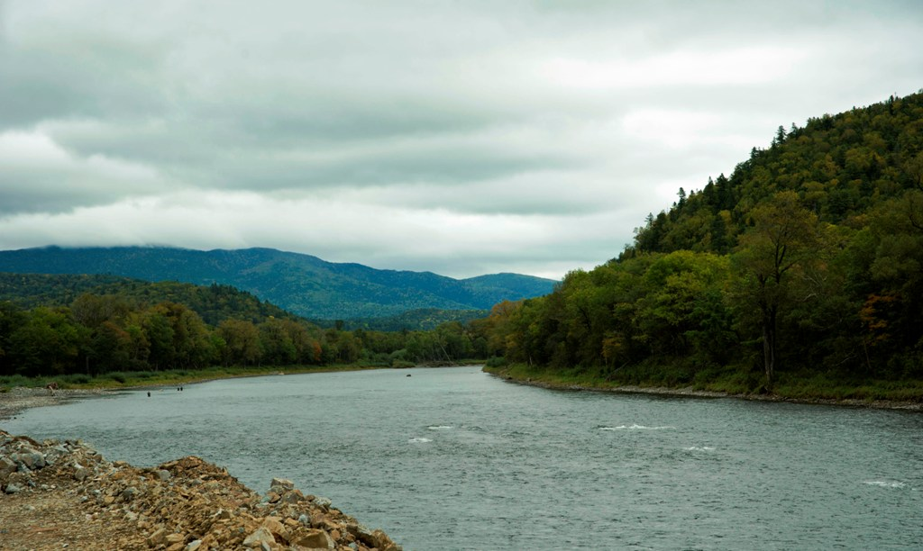 Река Анюй